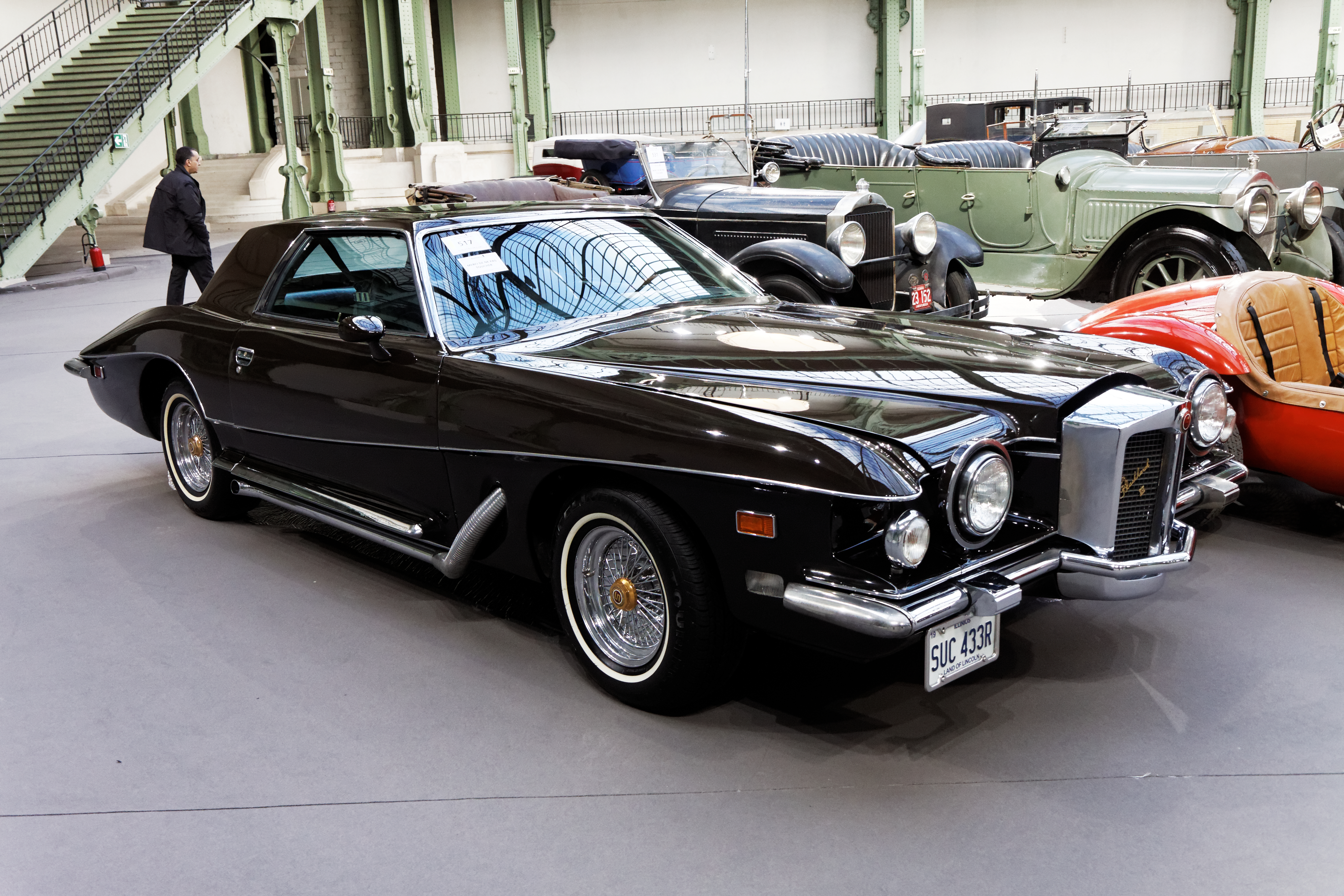 Une Stutz Blackhawk VI coupé de 1977.